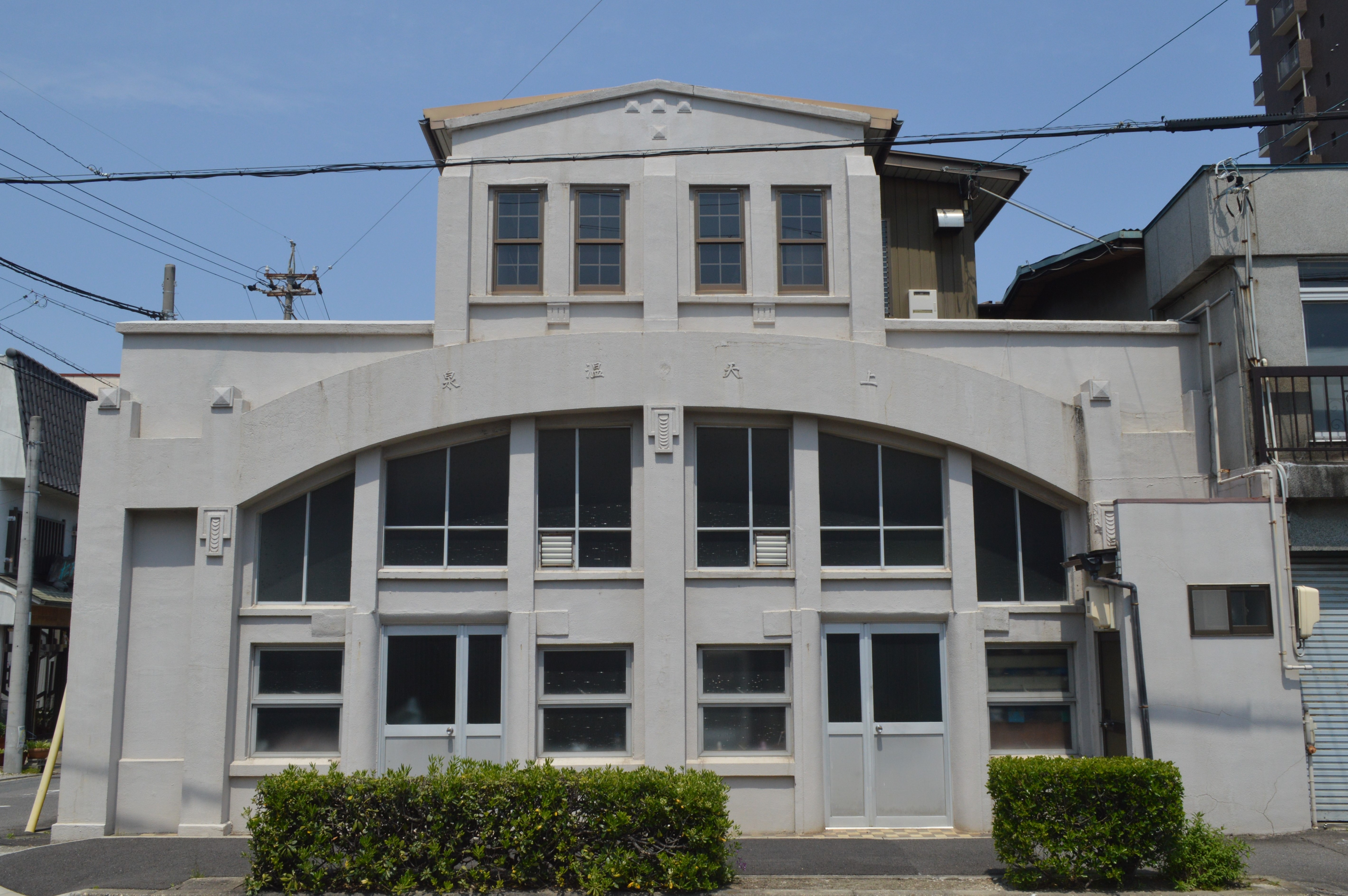 愛知県刈谷市御幸町1丁目215-1にあった銭湯「上天温泉」（廃業）。